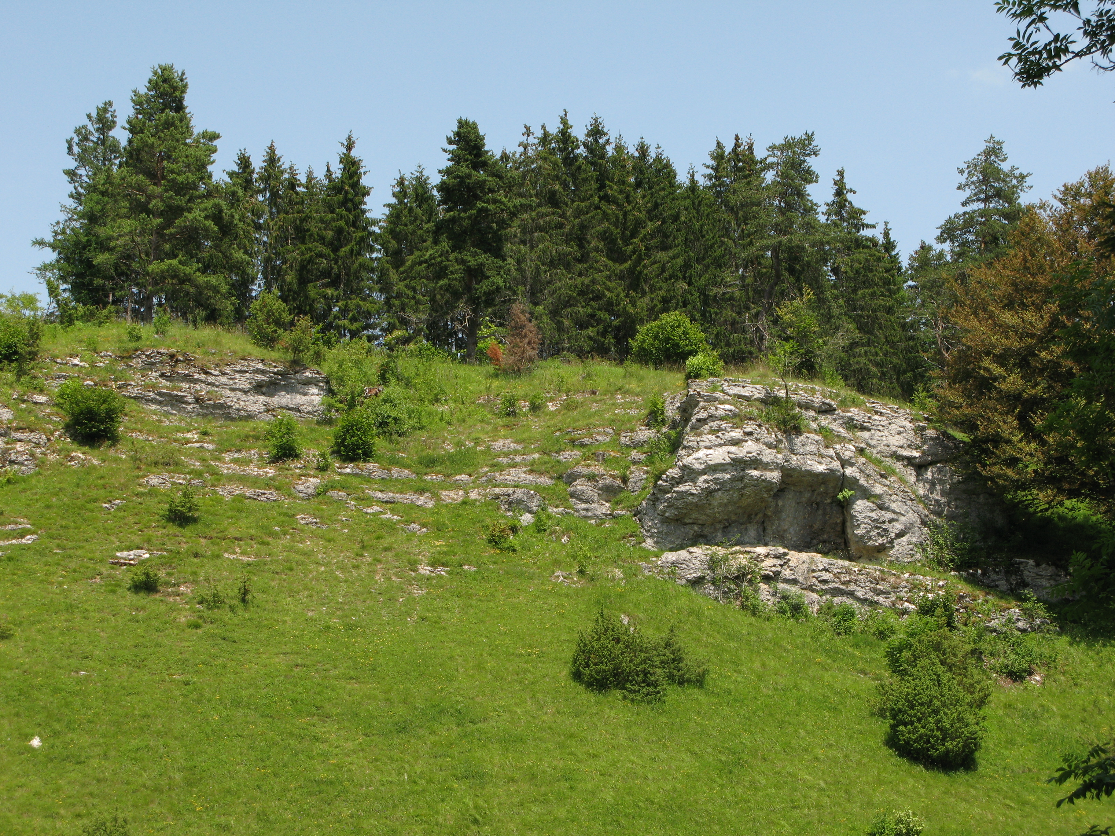 Schäfertal bei Böttingen auf dem Donauberglandweg auf der Schwäbischen Alb.